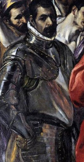 Detalle del cuadro El Expolio, pintado por El Greco y conservado en la sacristía de la catedral de Toledo, (España).